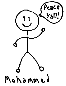 Salaam Alaykum